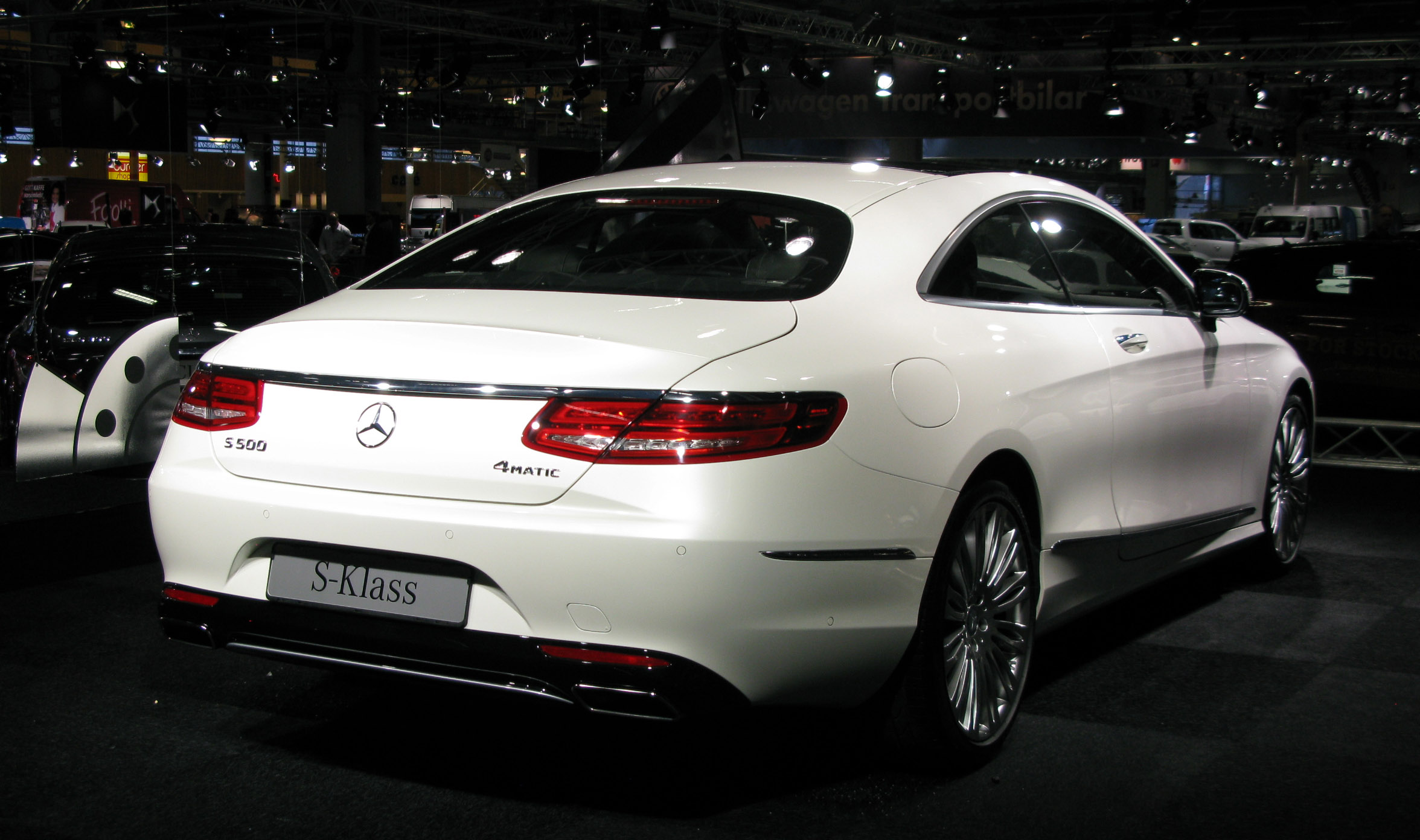 Mercedes-Benz S500 Coupé